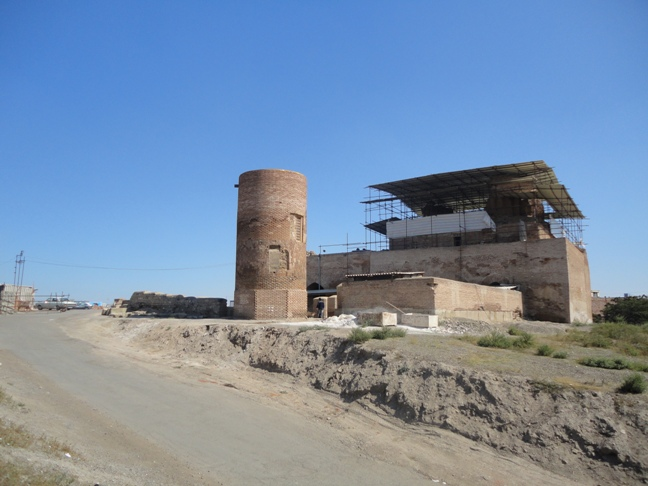 مسجد جامع اردبیل